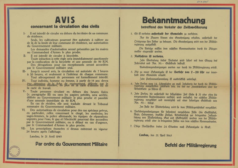 betreffend den Verkehr der Zivilbevölkerung ... Befehl der Militärregierung Kommentar: Zweisprachig frz. - dt Plakatart: Textplakat Allgemein Auftraggeber: Französische Militärregierung Objekt-Signatur: 10-044 : 2 Bestand: Allgemeine Plakate aus den Besatzungszonen (10-044) GliederungBestand10-18: Allgemeine Plakate aus den Besatzungszonen (10-044) » Französische Militärregierung Lizenz: KAS/ACDP 10-044 : 2 CC-BY-SA 3.0 DE